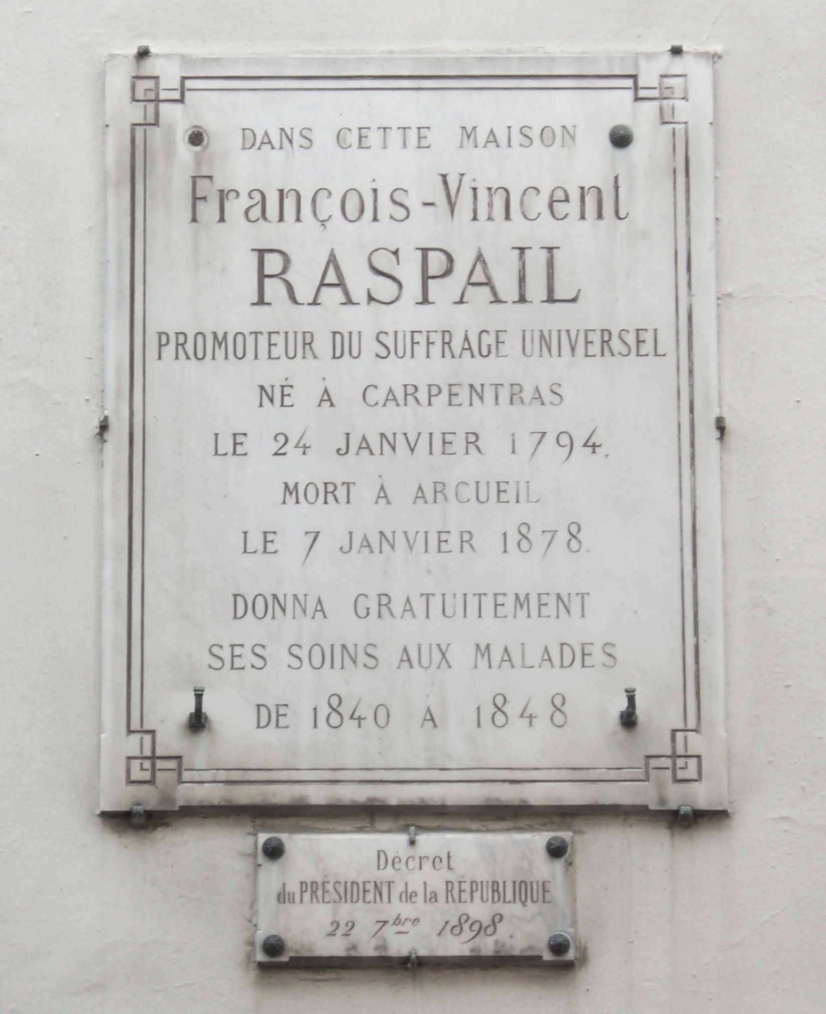 Plaque apposée au n° 5 de la rue de Sévigné, Paris 4e. « Dans cette maison, François-Vincent Raspail, promoteur du suffrage universel, né à Carpentras le 24 janvier 1794, mort à Arcueil le 7 janvier 1878, donna gratuitement ses soins aux malades de 1840 à 1848. »